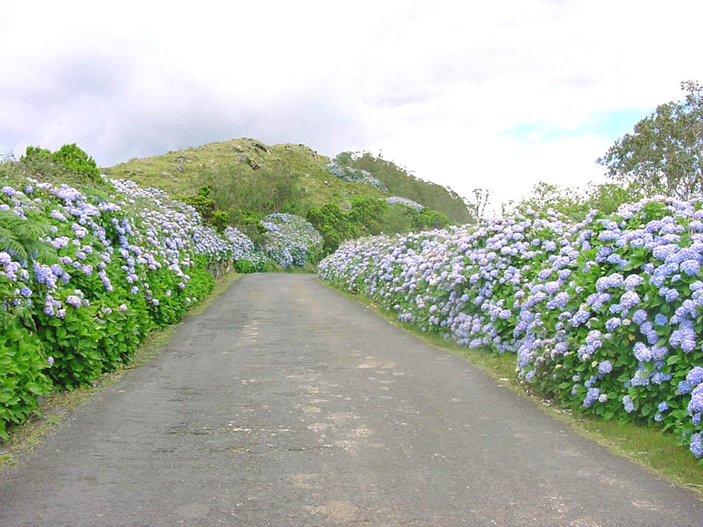 Estrada típica dos Açores, caminhos de hortênsias, Interior da ilha Terceira, Açores, Portugal.